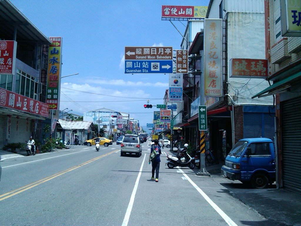 台9線關山路段